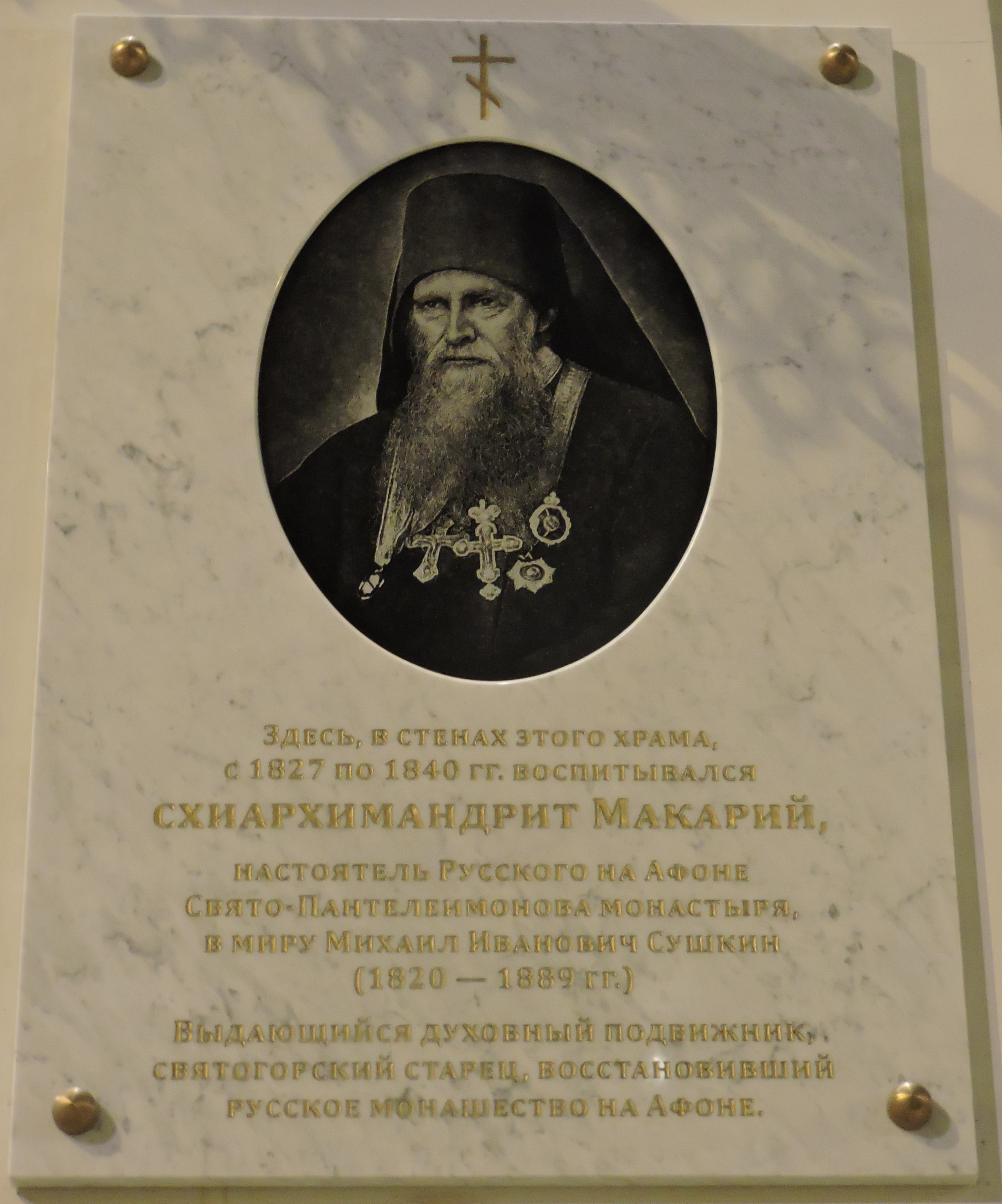 Мемориальная доска схиархимандриту Макарию справа от входа в церковь Святой Екатерины